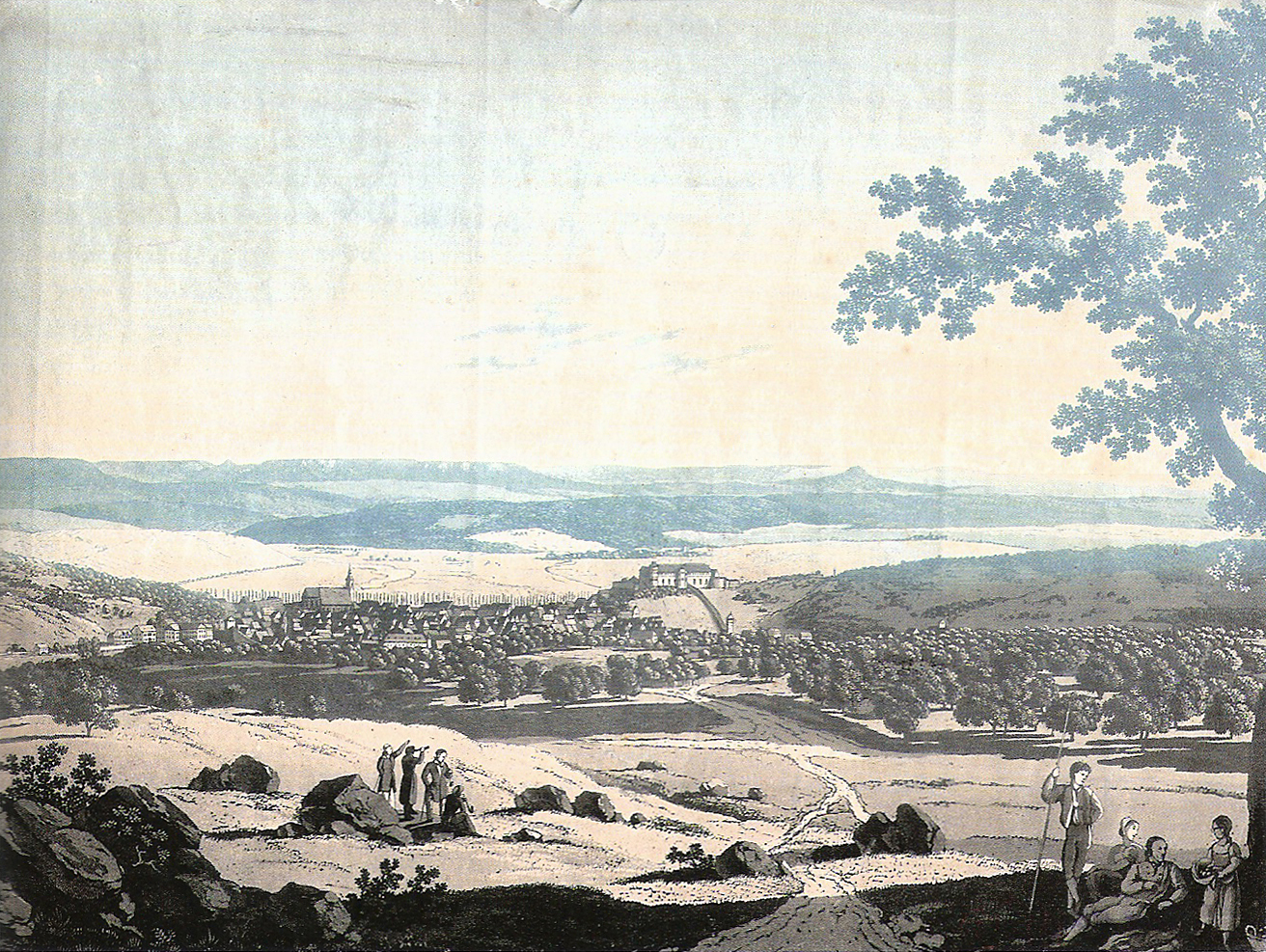 Tübingen vom Steinenberg (Aquatinta, 23,5 × 31,0 cm); Schefold 9311